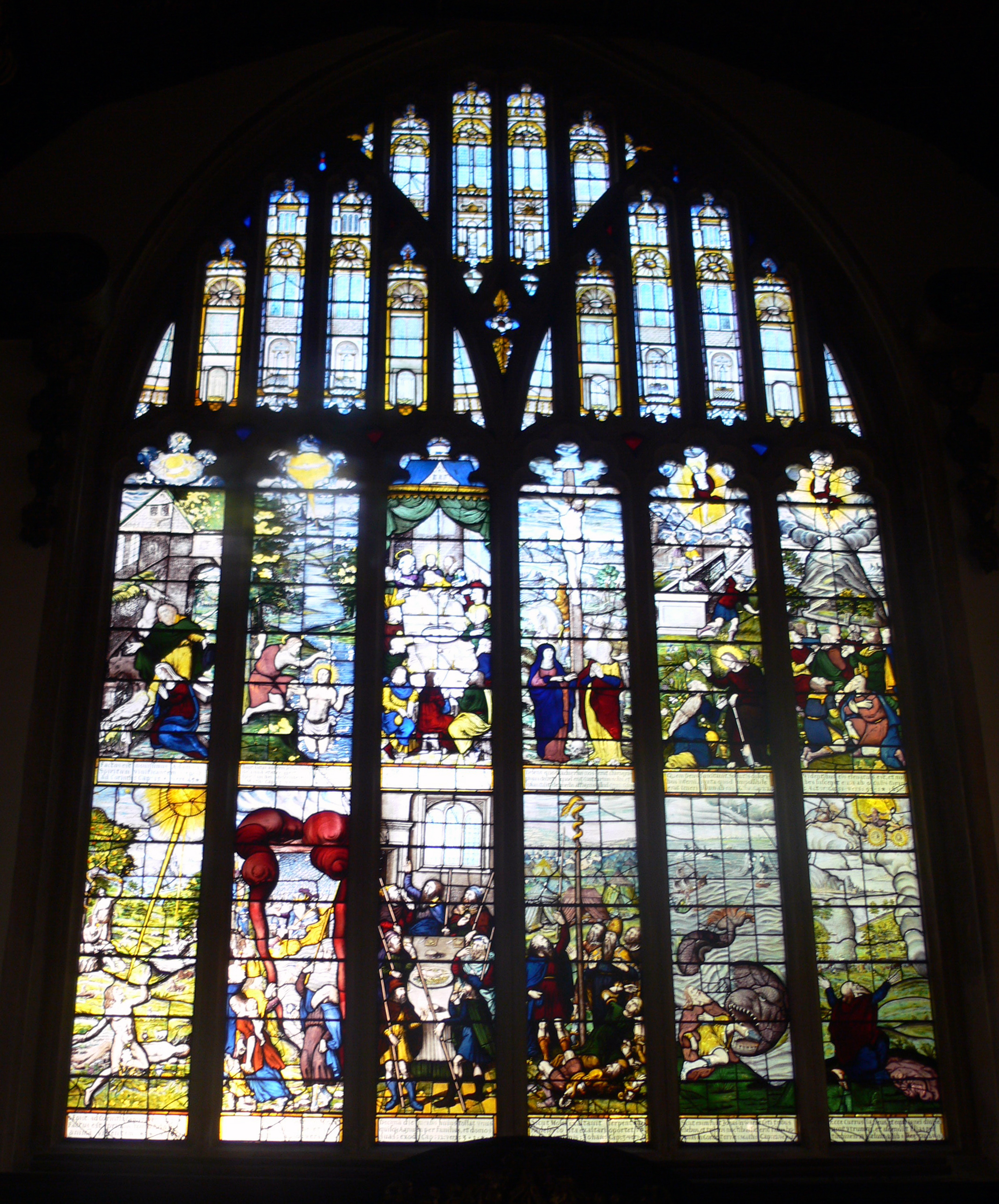 Oxford - Lincoln College - Chapel